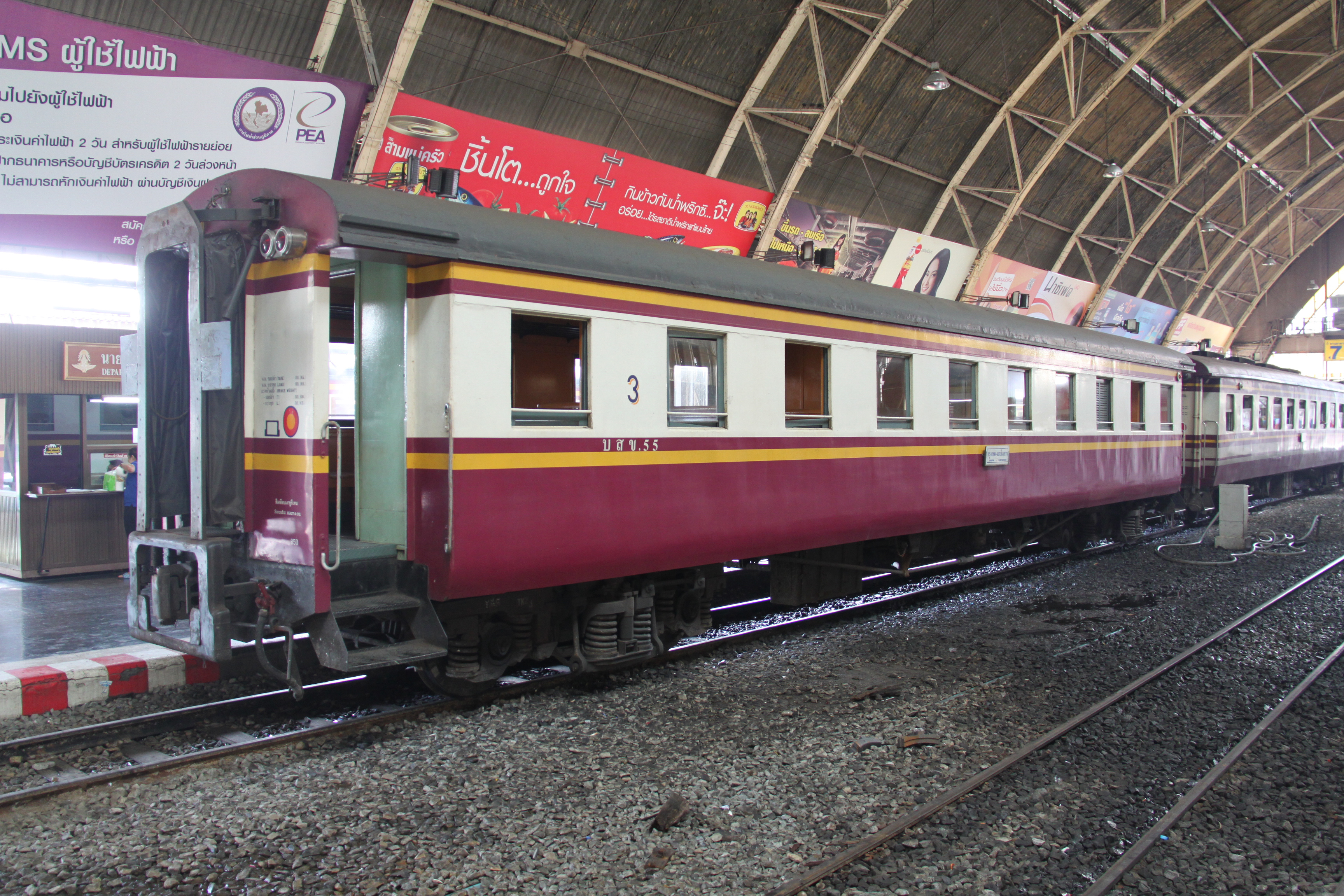 Carriage of Thailand State Railways